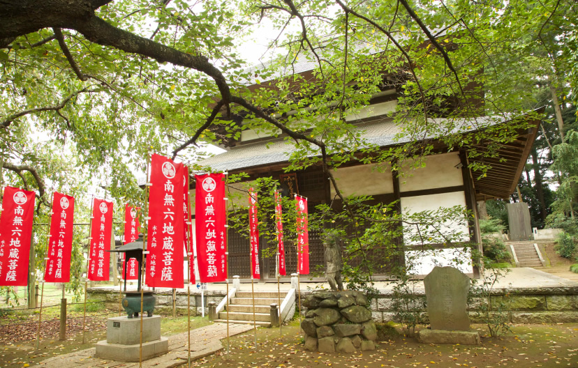 六地蔵寺地蔵堂